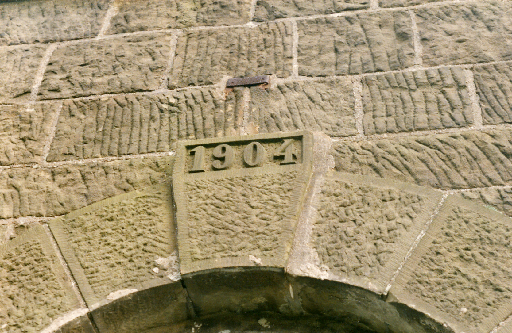 Baudenkmal Wuppertal-Langerfeld Wasserbehälter Baujahr über Eingangstür 1904